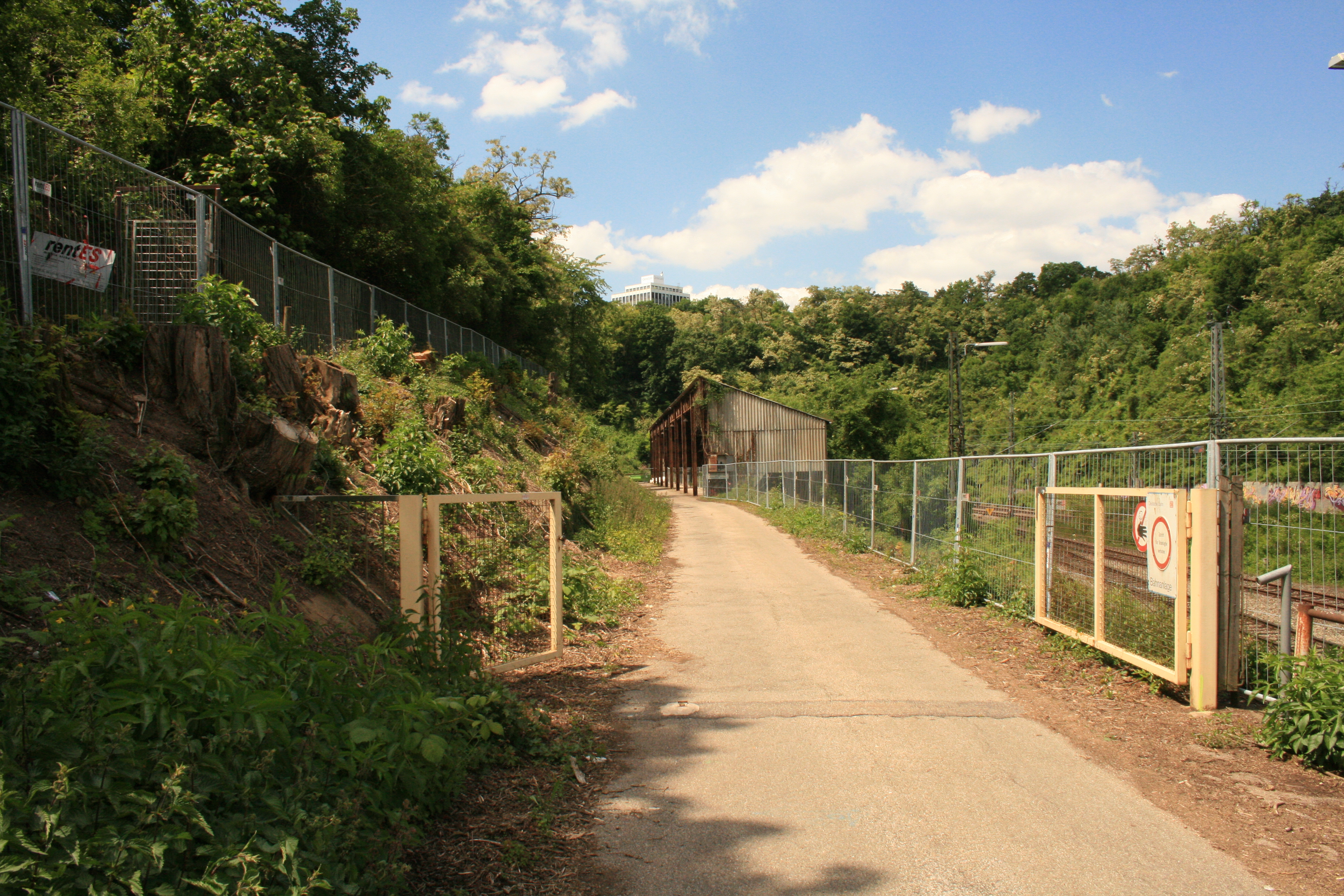 Zufahrt zum künftigen Zwischenangriff Prag des Tunnels Feuerbach